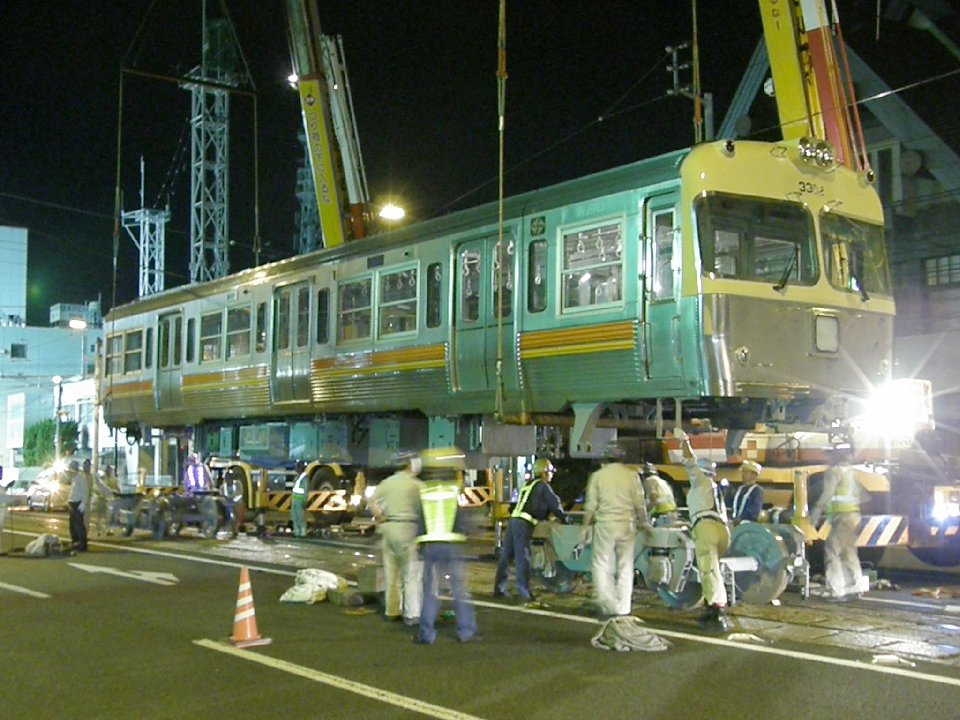 伊予鉄道/3000系（3302）/宮田町にて搬入